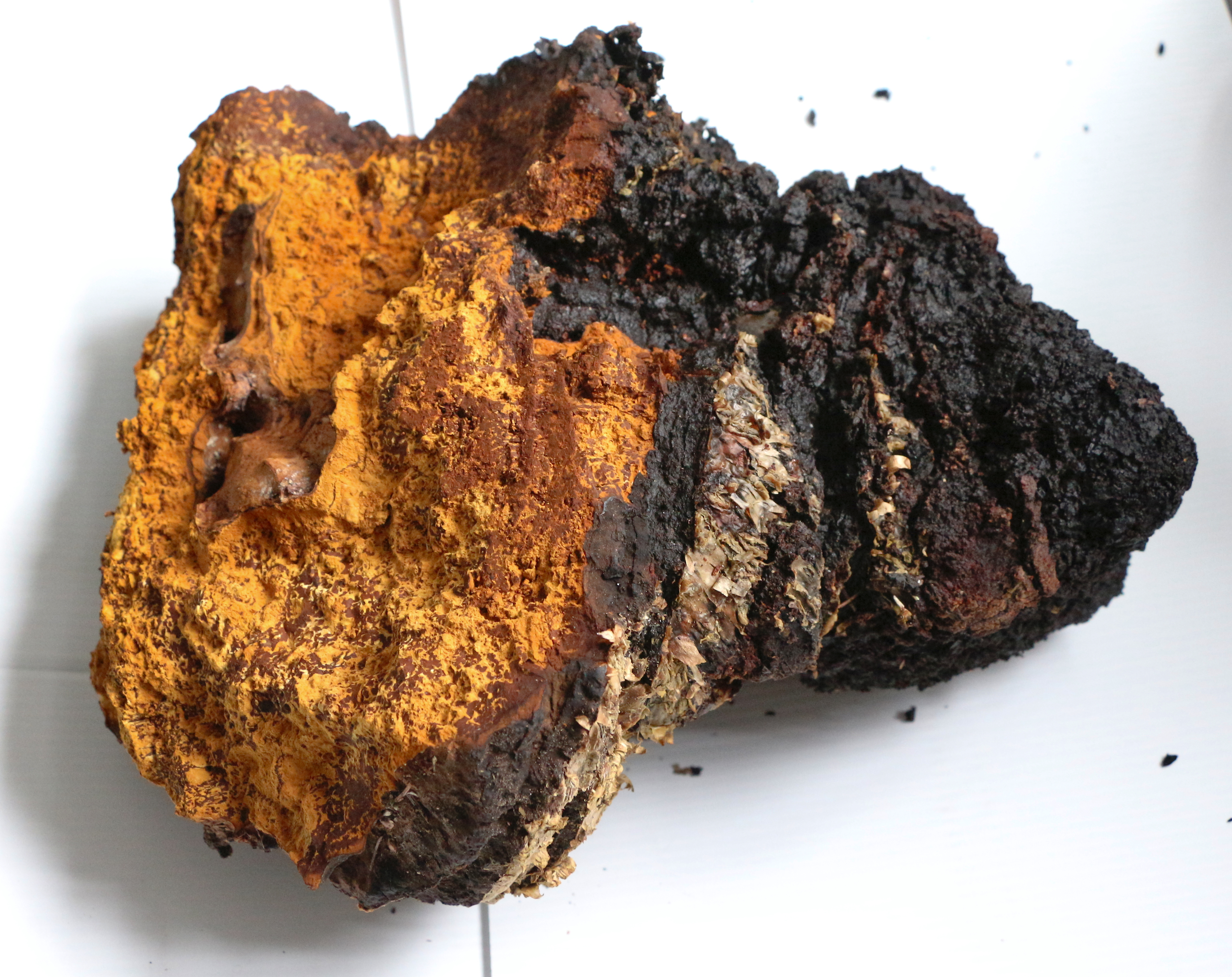 On voit ici un champignon Inonotus obliquus (chaga) d'environ 4,2 kg qui s'est développé sur un bouleau jaune. On peut aisément différencier l'hyménophore stérile ressemblant à du charbon de bois brûlé et le reste du champignon de couleur brun clair et de consistance beaucoup moins dure.